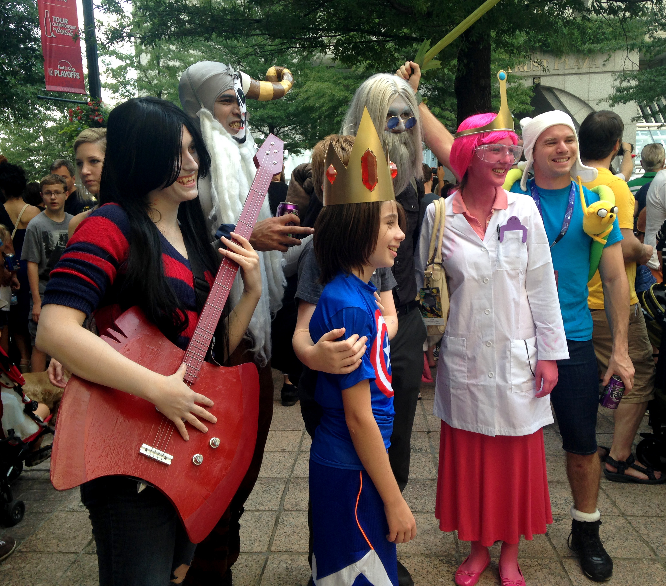 Cosplay at Dragon Con 2014.